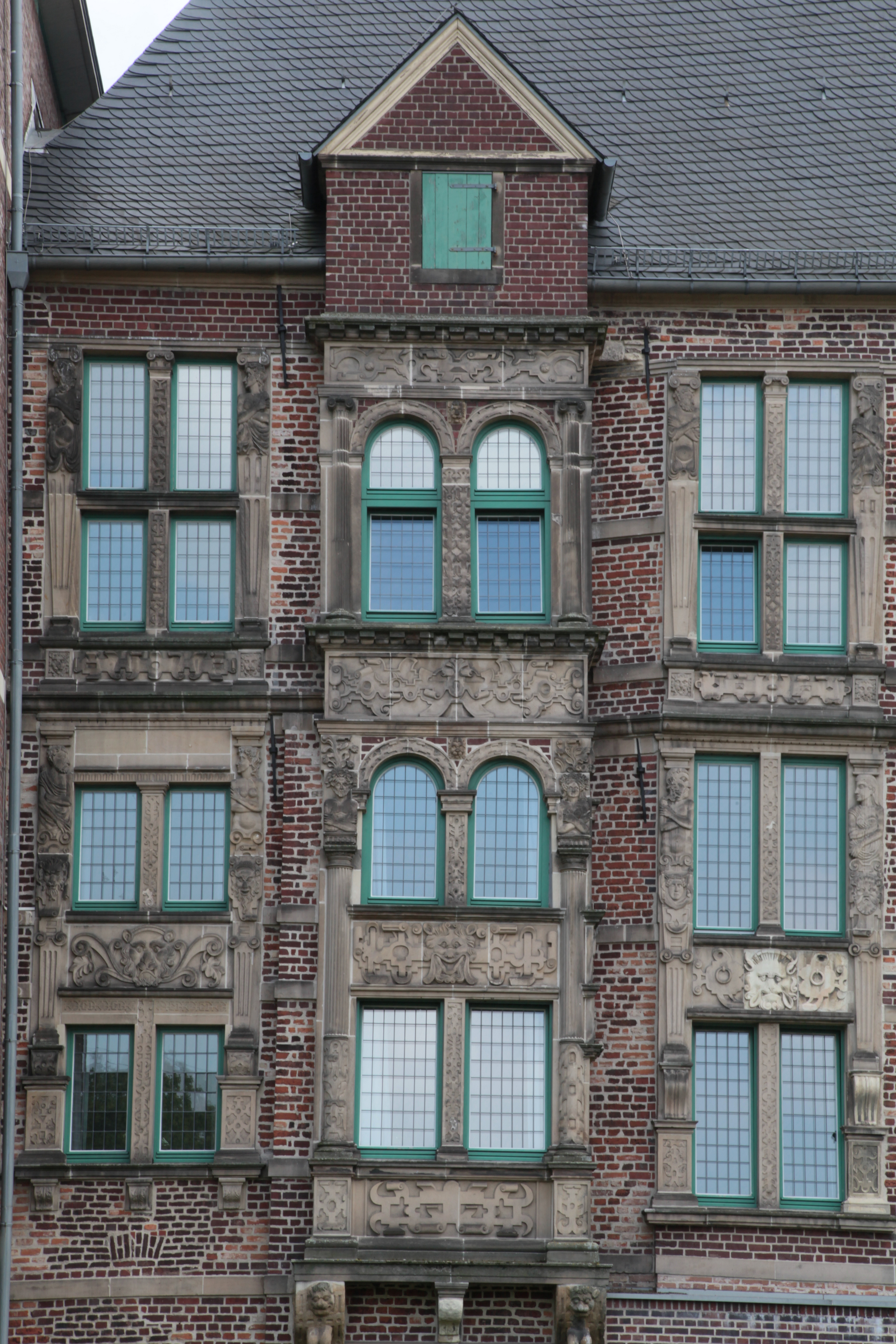 Schloss Horst, Turfstraße in Gelsenkirchen: Erker (Westflügel)